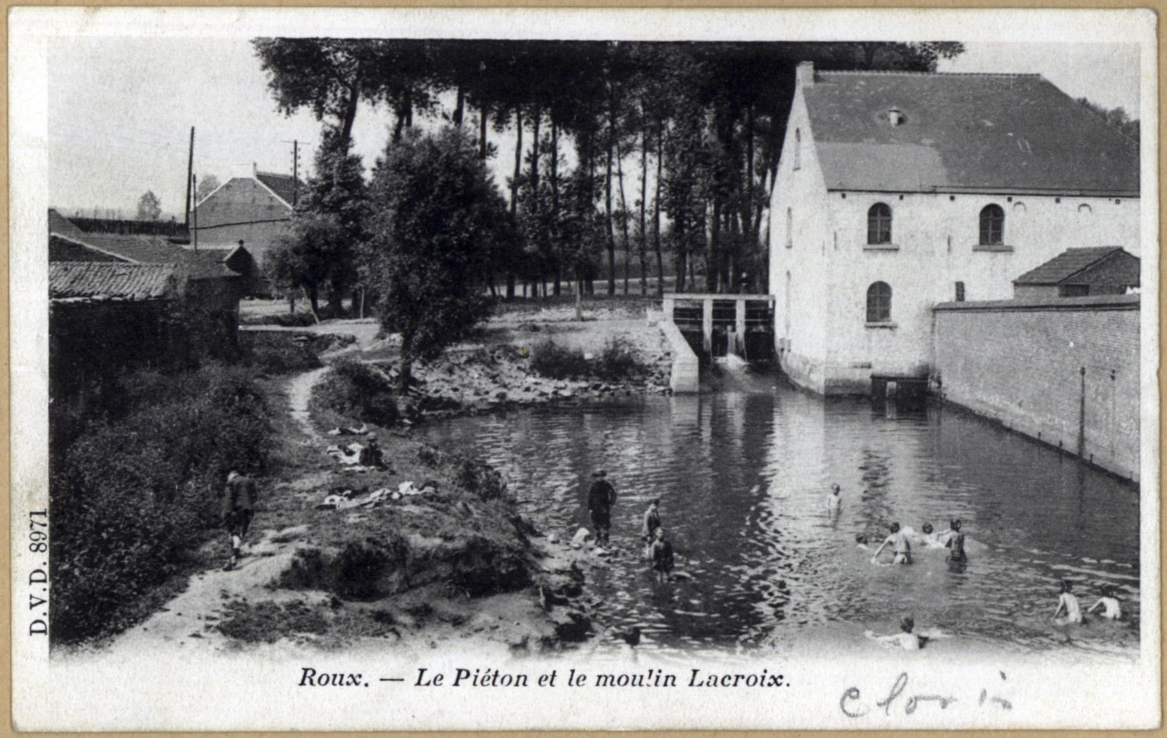 Roux (Charleroi - Belgique) - Le Piéton et le moulin Lacroix (début du XXe siècle)